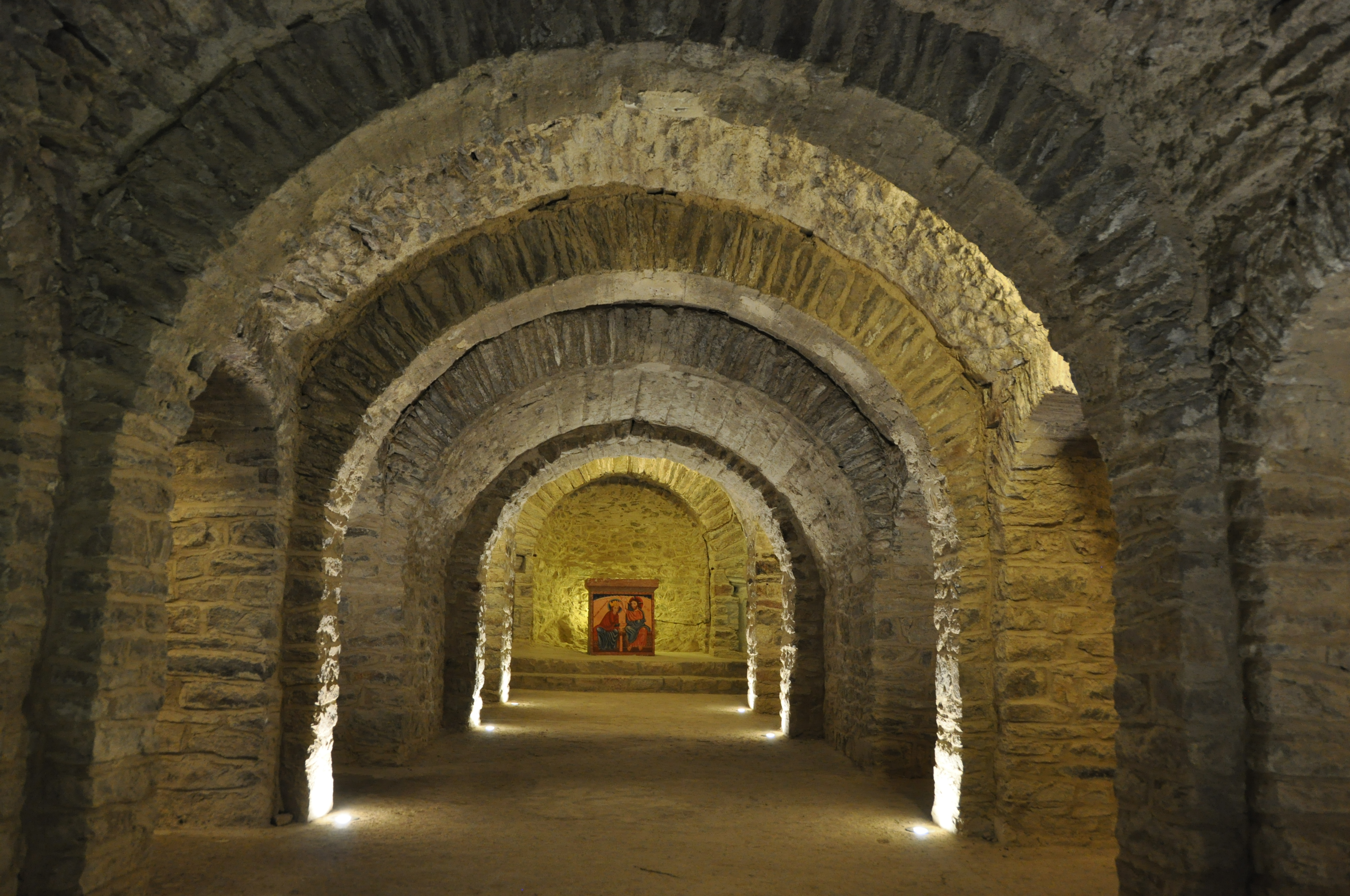 Castell de Vernet. St Martí del Canigó Abbey. Crypt. 11th C.